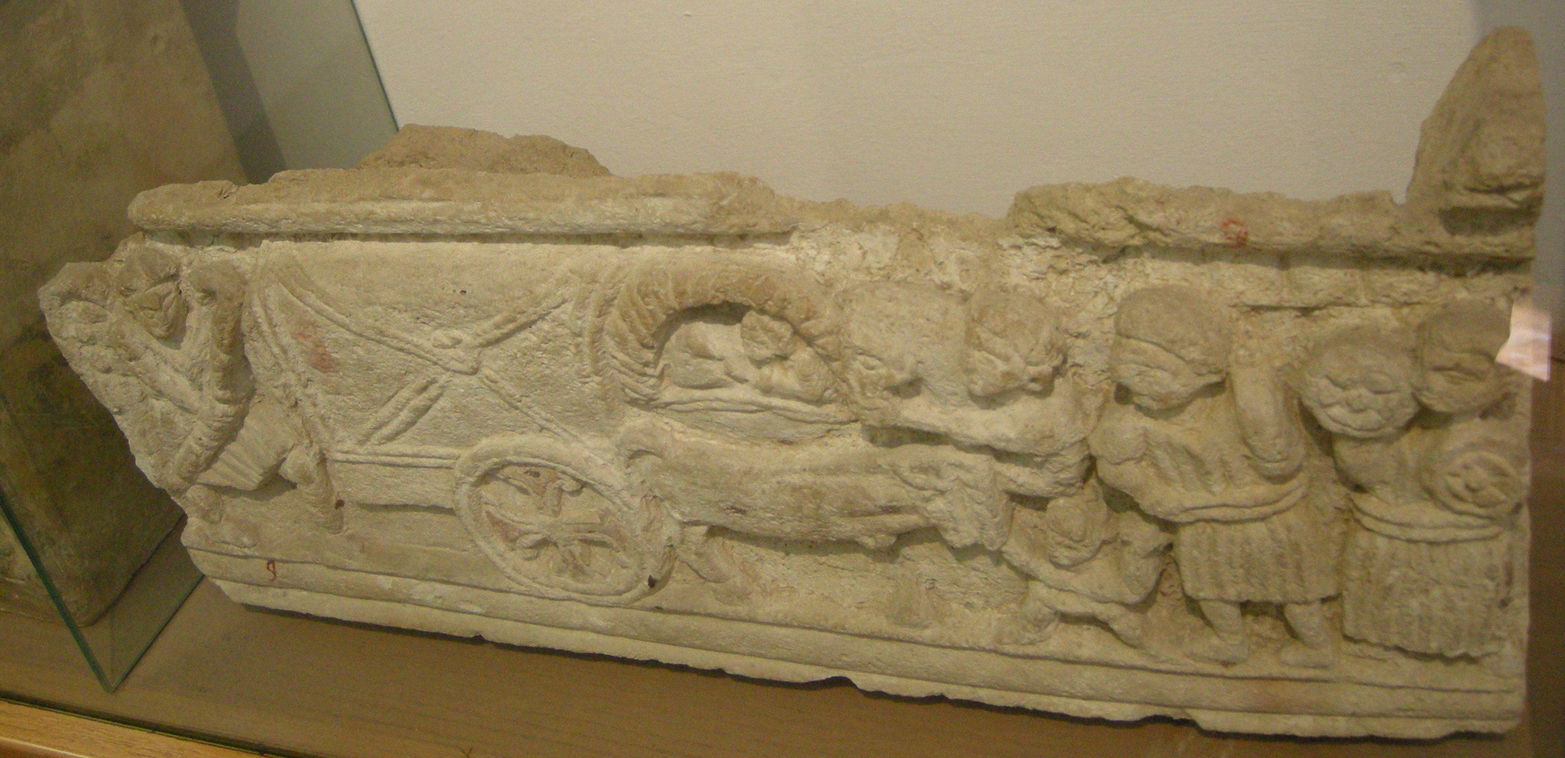 Urnetta da volterra in tufo con bassorilievo di viaggio agli inferi su carpentum, I sec. ac.